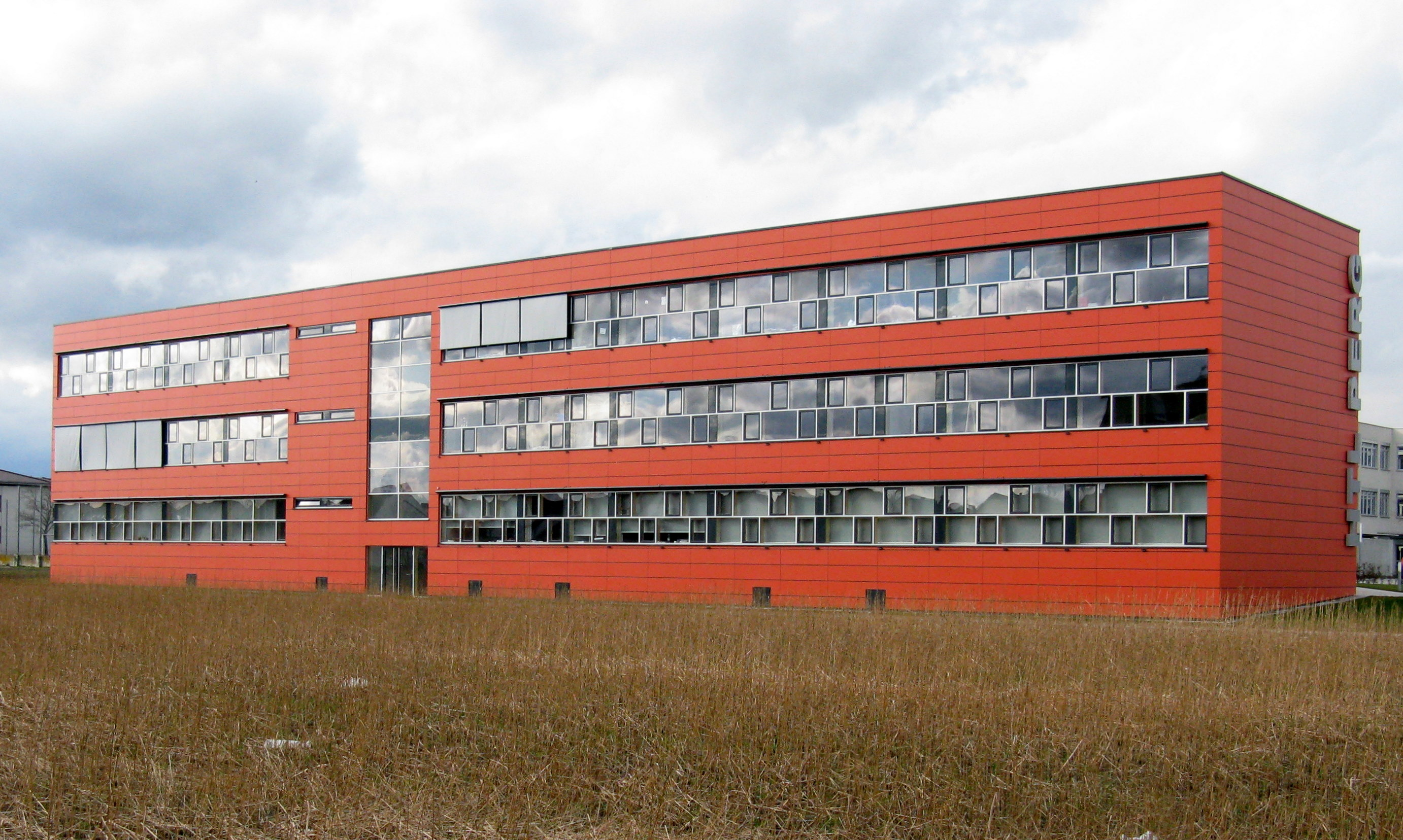 HTL Perg, 2007 bezogenes Schulgebäude